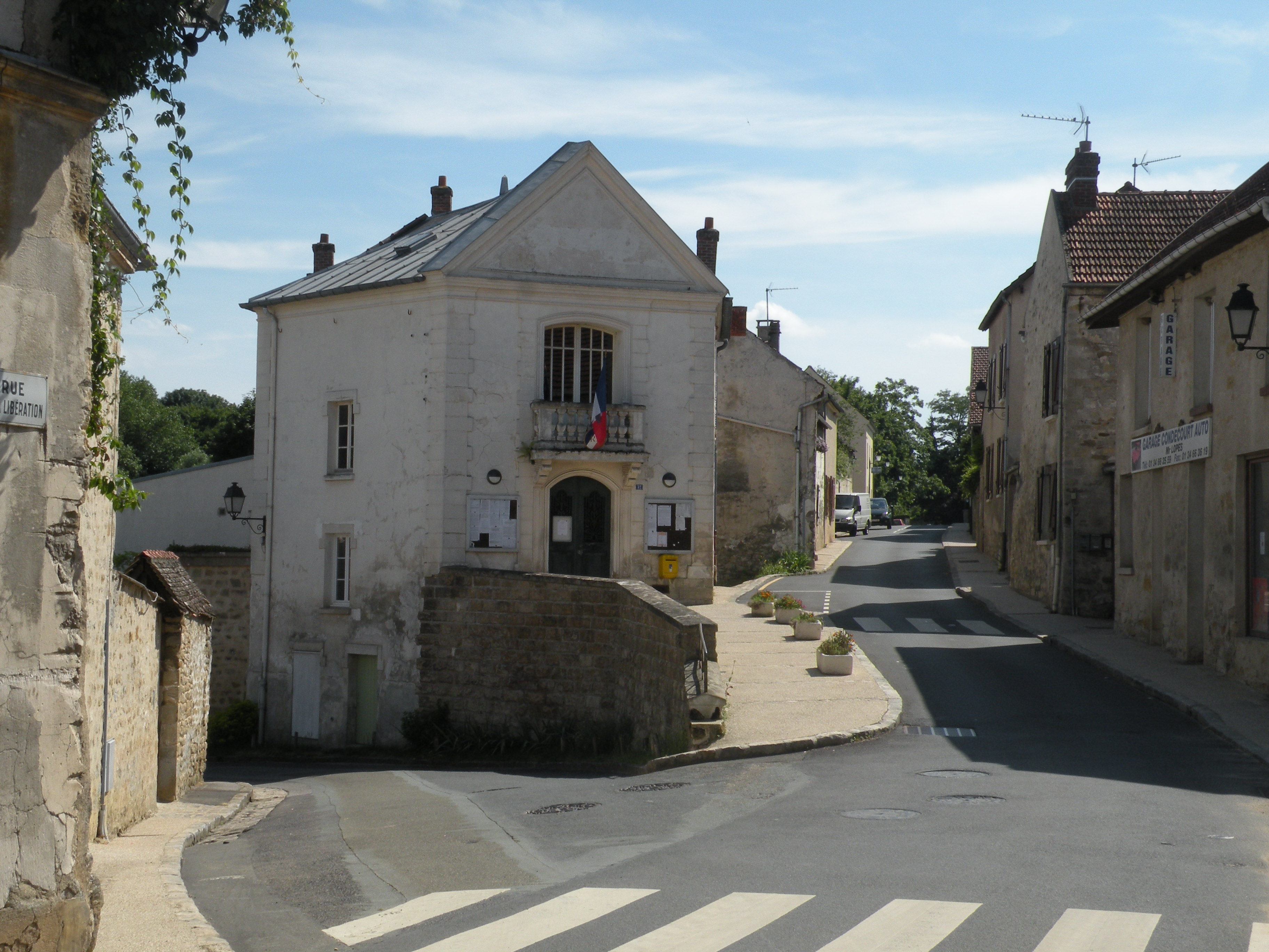 La mairie de Condécourt.